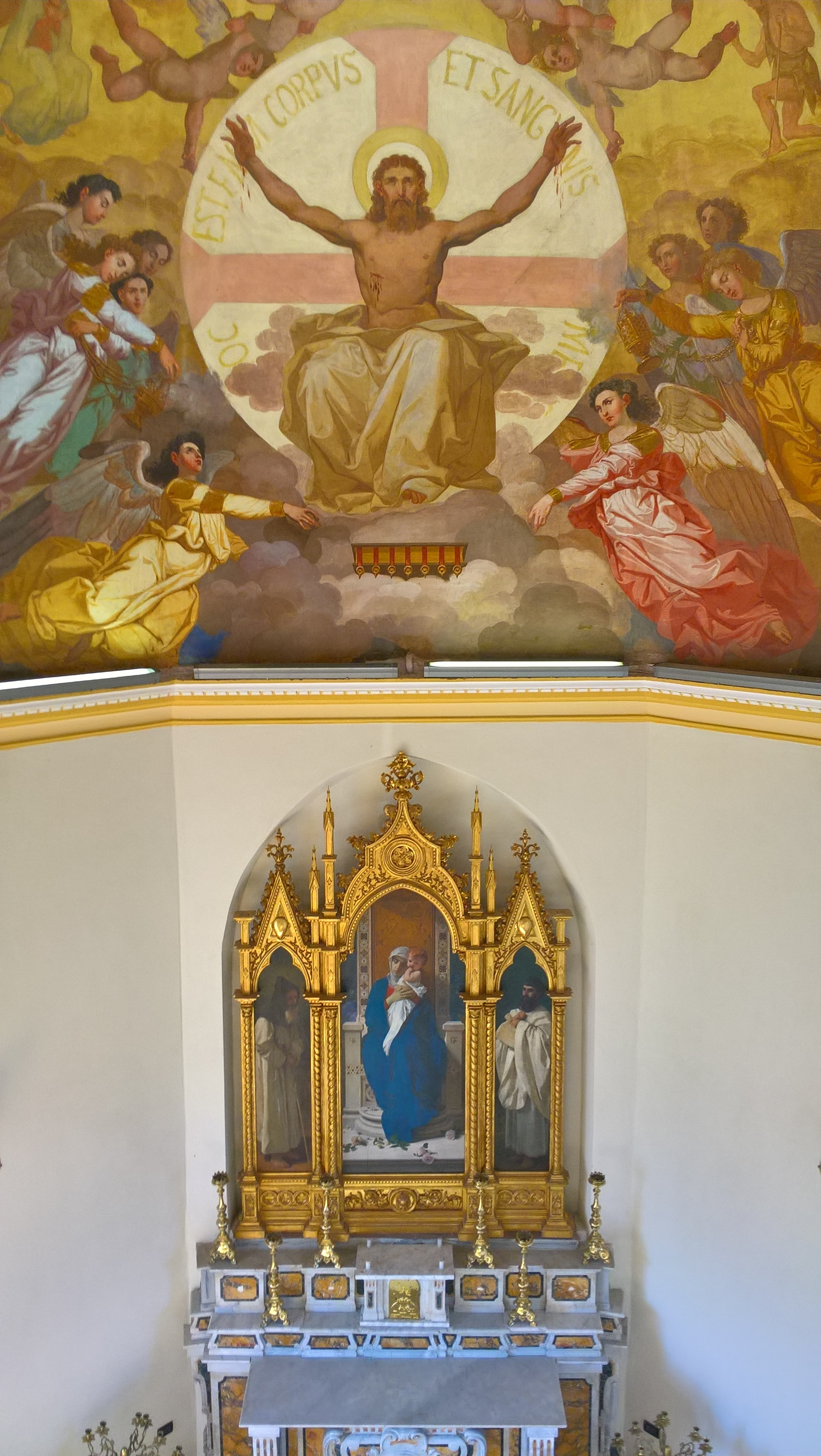 Teil der Kuppel und Altar mit Triptychon: Madonna der Rosen, links: Augustinus von Hippo, rechts: Antonius der Große